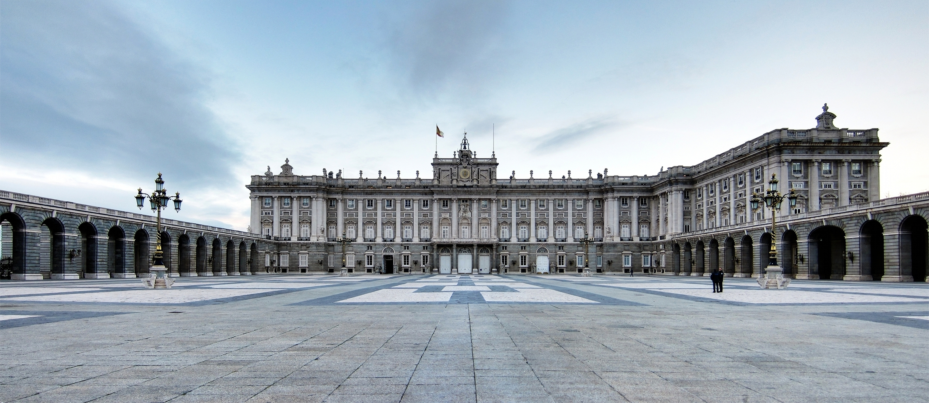 Palacio Real de Madrid.